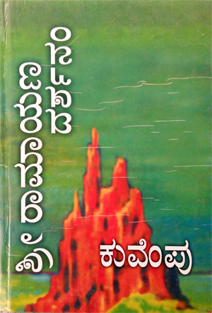 ಕನ್ನಡ: ಶ್ರೀರಾಮಾಯಣ ದರ್ಶನಂ